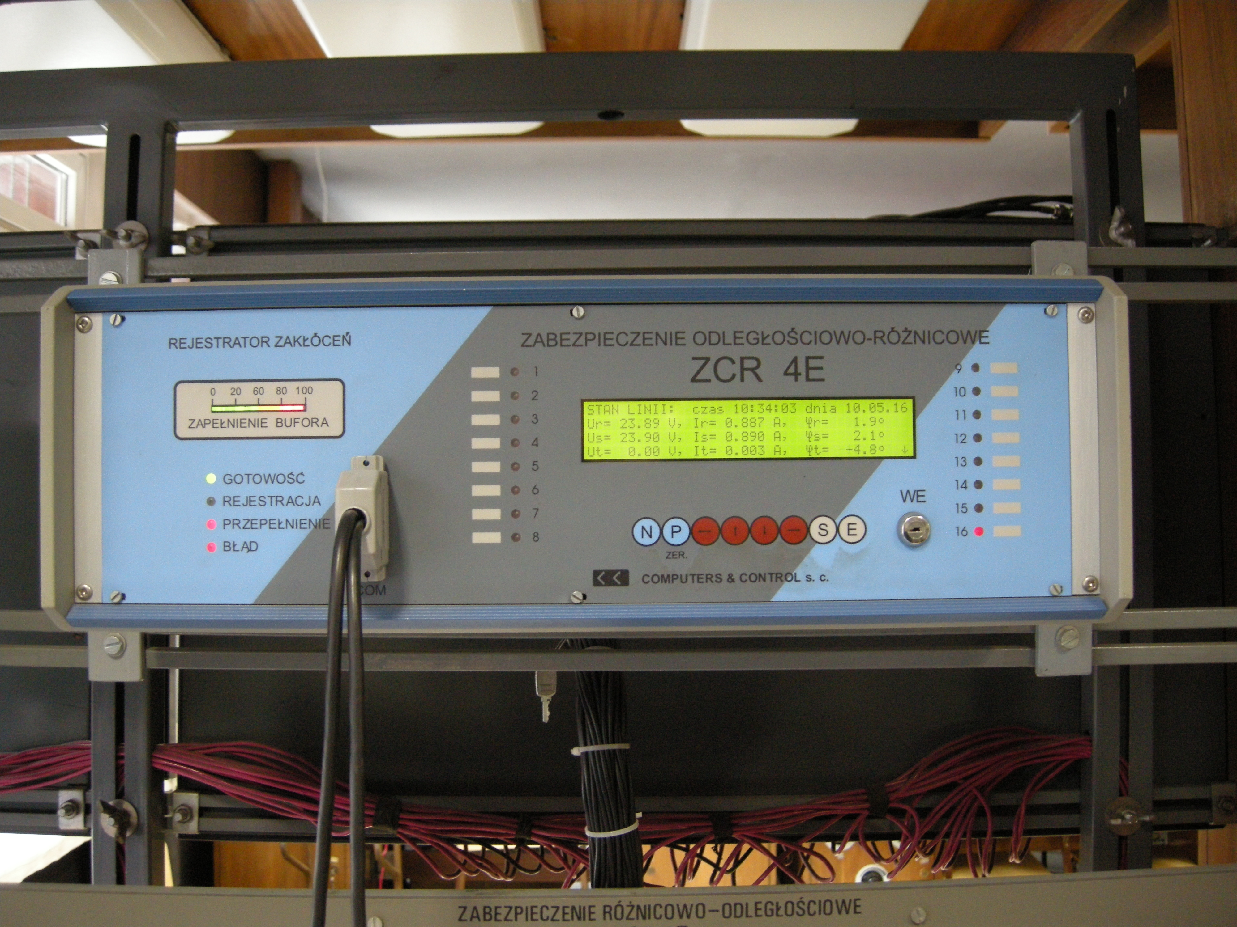 Zabezpieczenie odległościowo-różnicowe. Rejestrator zdarzeń.